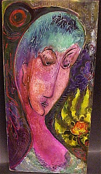 Bednay Éva: Gondolkod, lakk-kép az 1960-as évekbőló